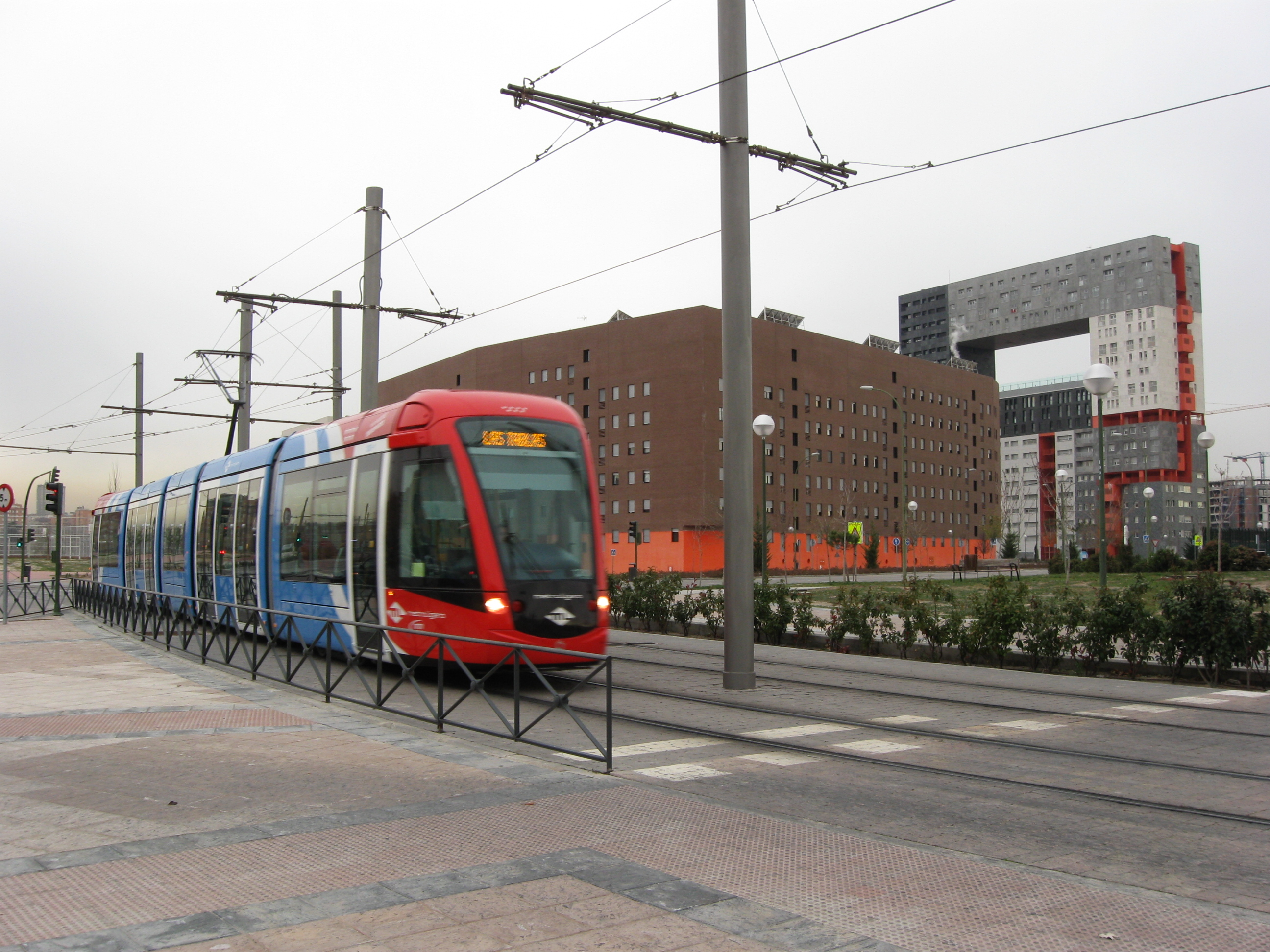 Rame de la ligne 1 du Metro Ligero de Madrid à proximité de la station Álvarez Villaamil.